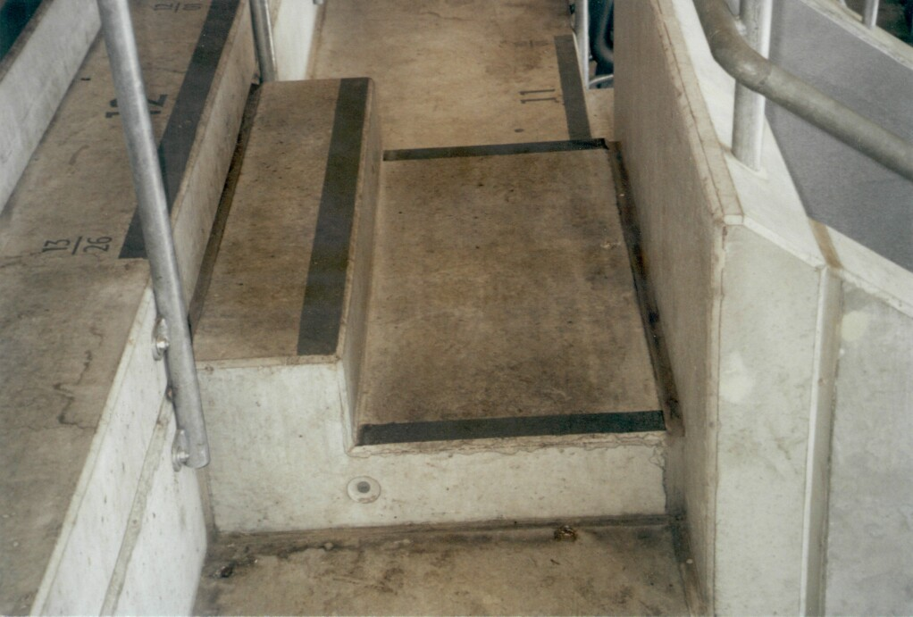 Allianz-Arena, Treppenaufgang dritter Rang